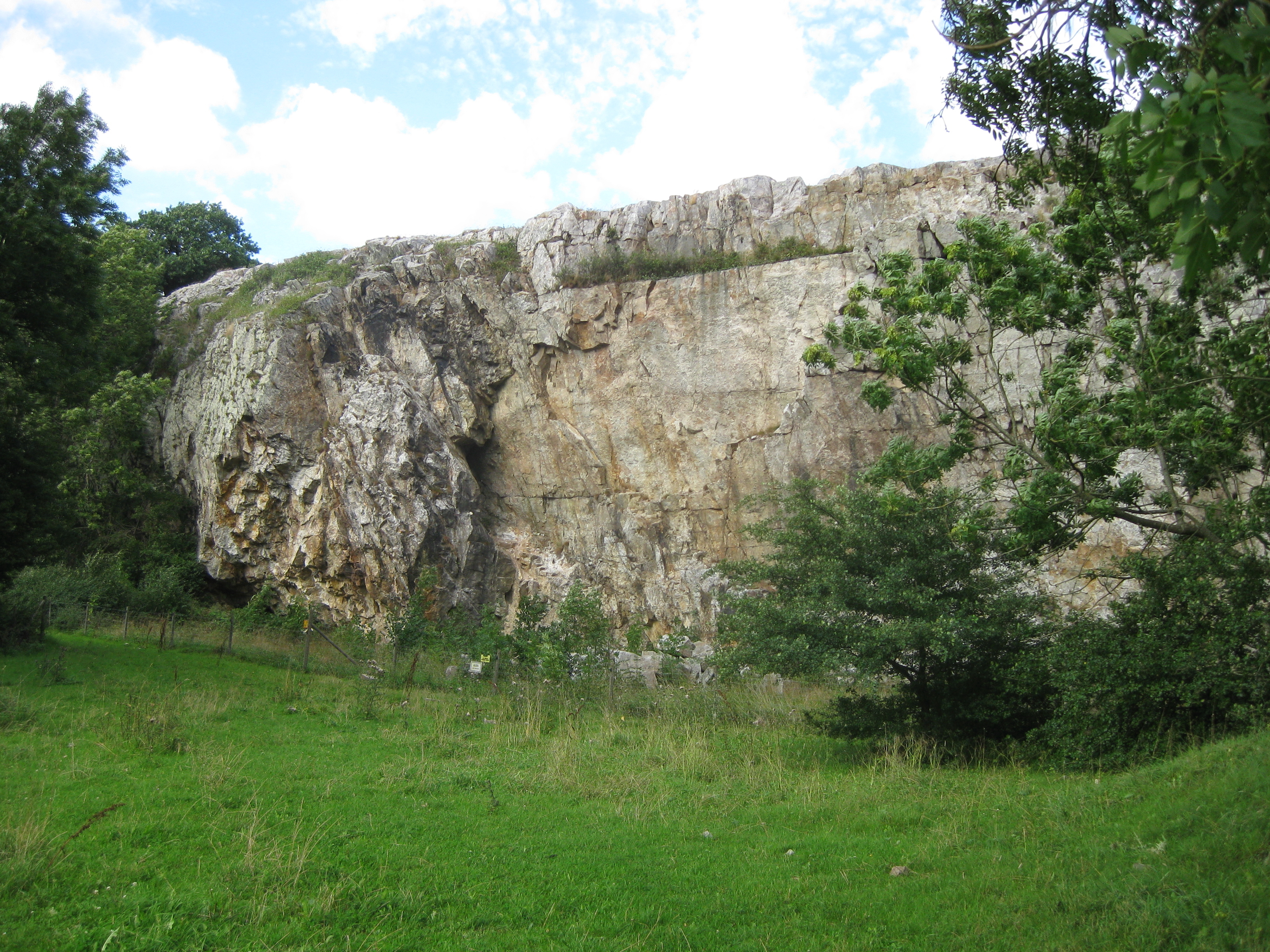 Impans naturreservat vid Gröstorp